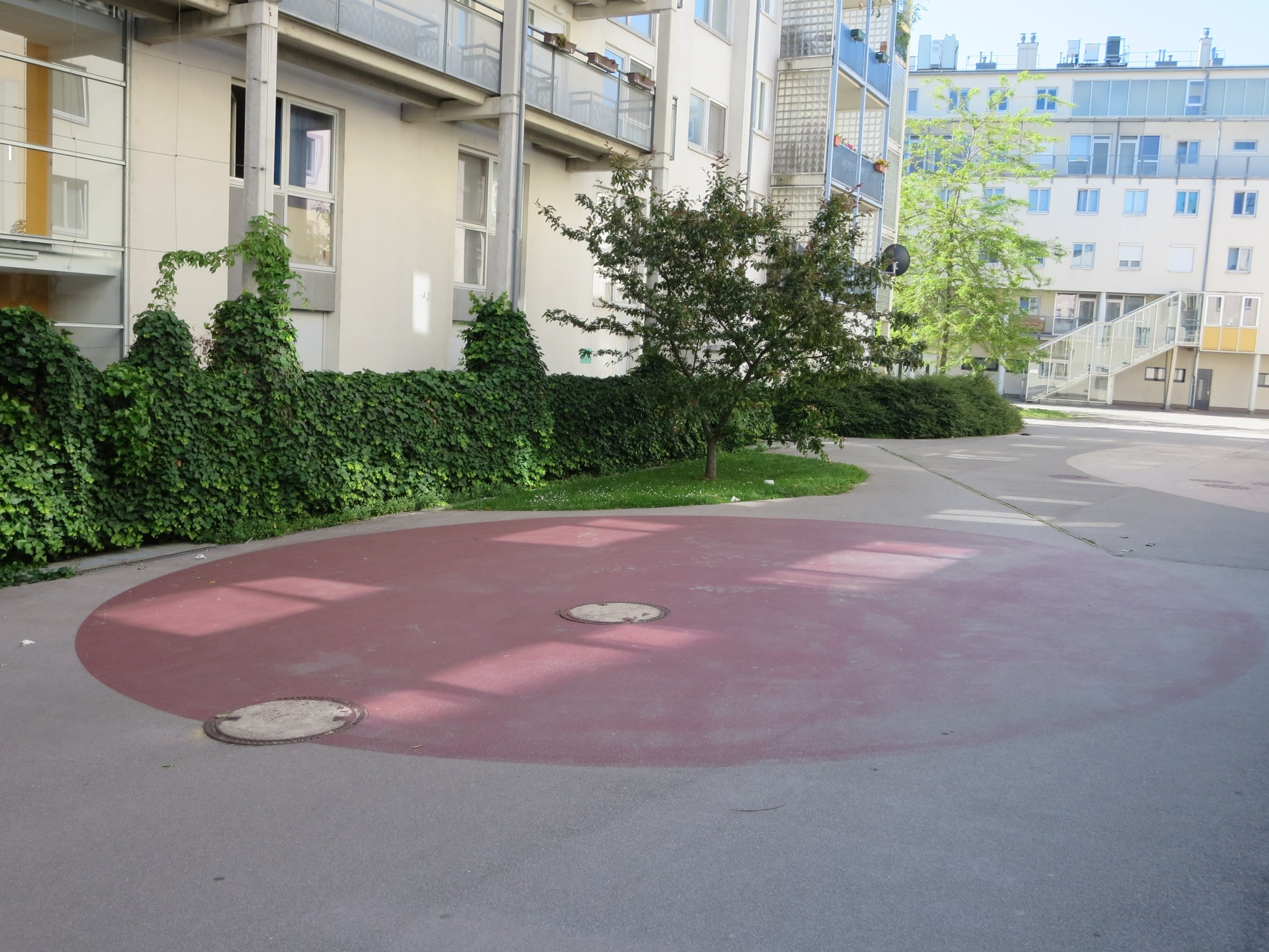 rundliche Farbfläche von Johanna Kandl aus dem Jahre 1997 im Margarete-Schütte-Lihotzky-Hof in der Donaufelder Straße 99, Wien-Floridsdorf. This media shows the Vienna residential building (Gemeindebau) with the ID 306.